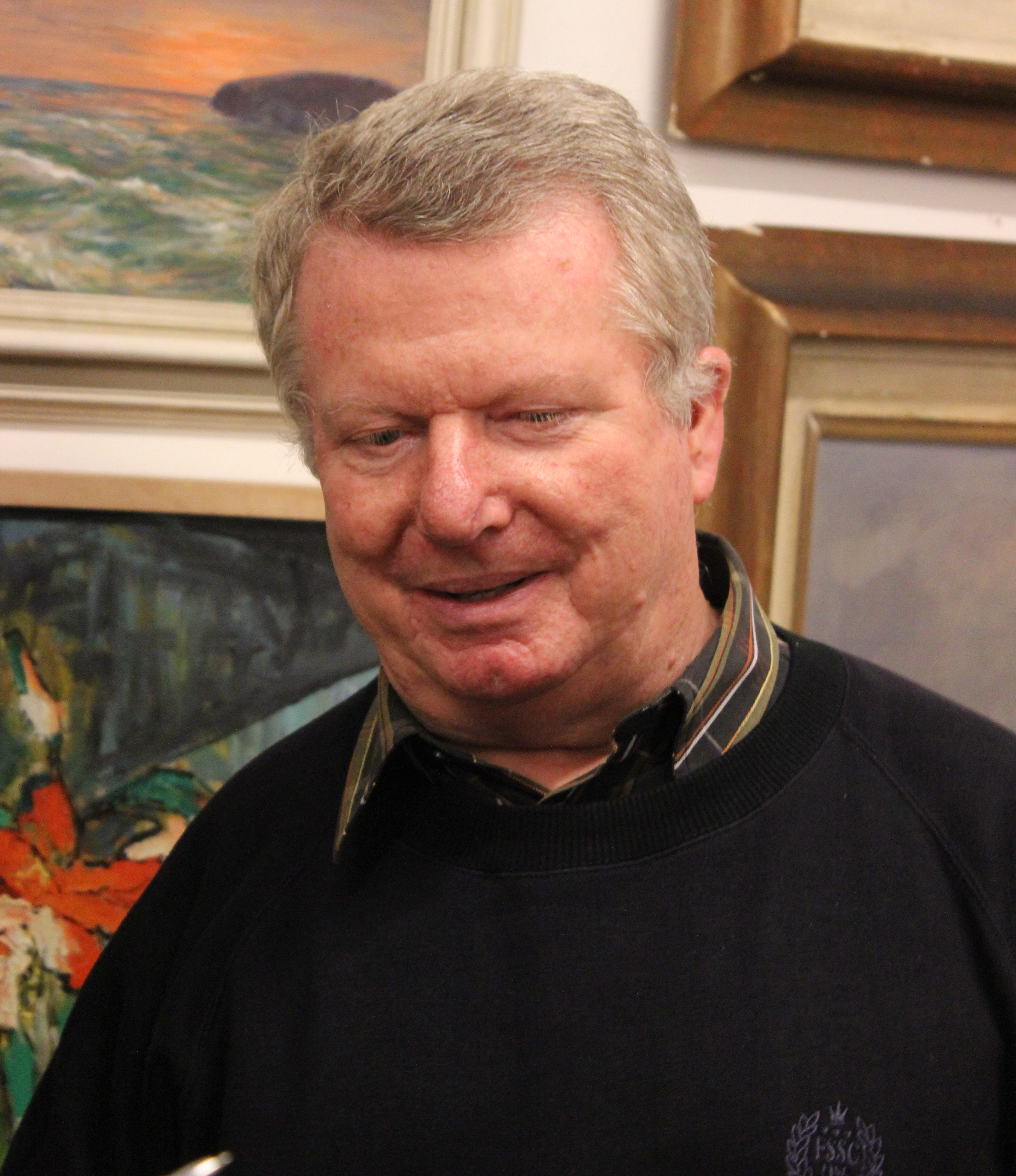 Karel Sýs na Maxiautogramiádě konané v pražské galerii Mánesova 54 péčí Vratislava Ebra.